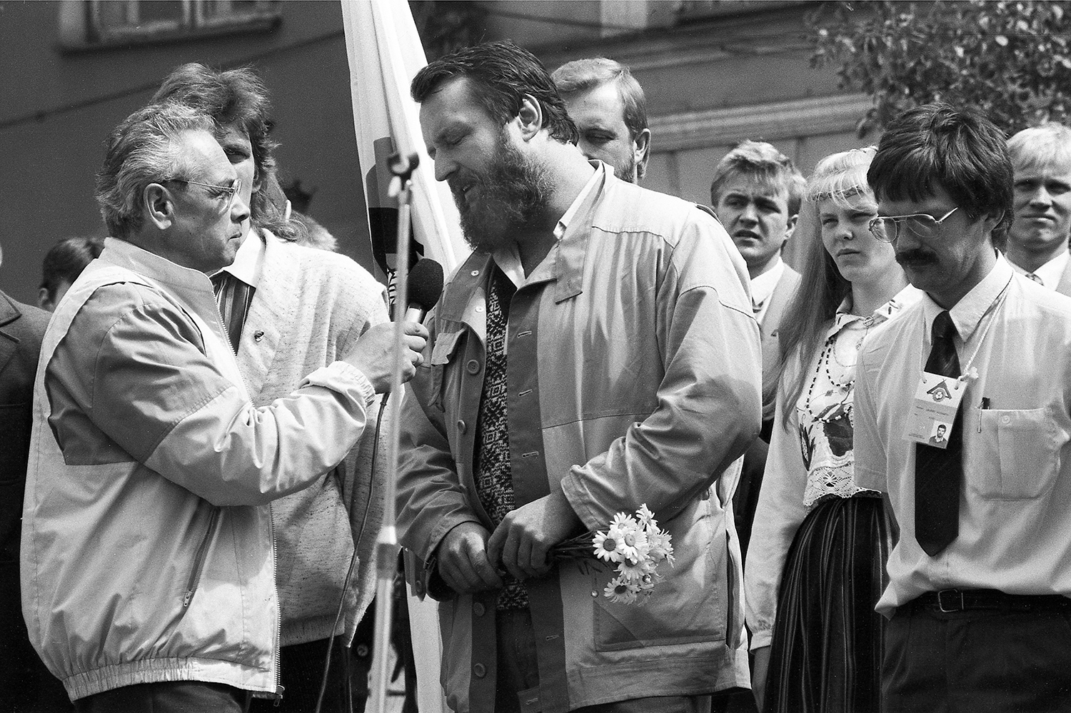 Rein Järlik, endine poliitik ja teleajakirjanik ja Ants Paju, kergejõustiklane, ajakirjanik ja poliitik 89